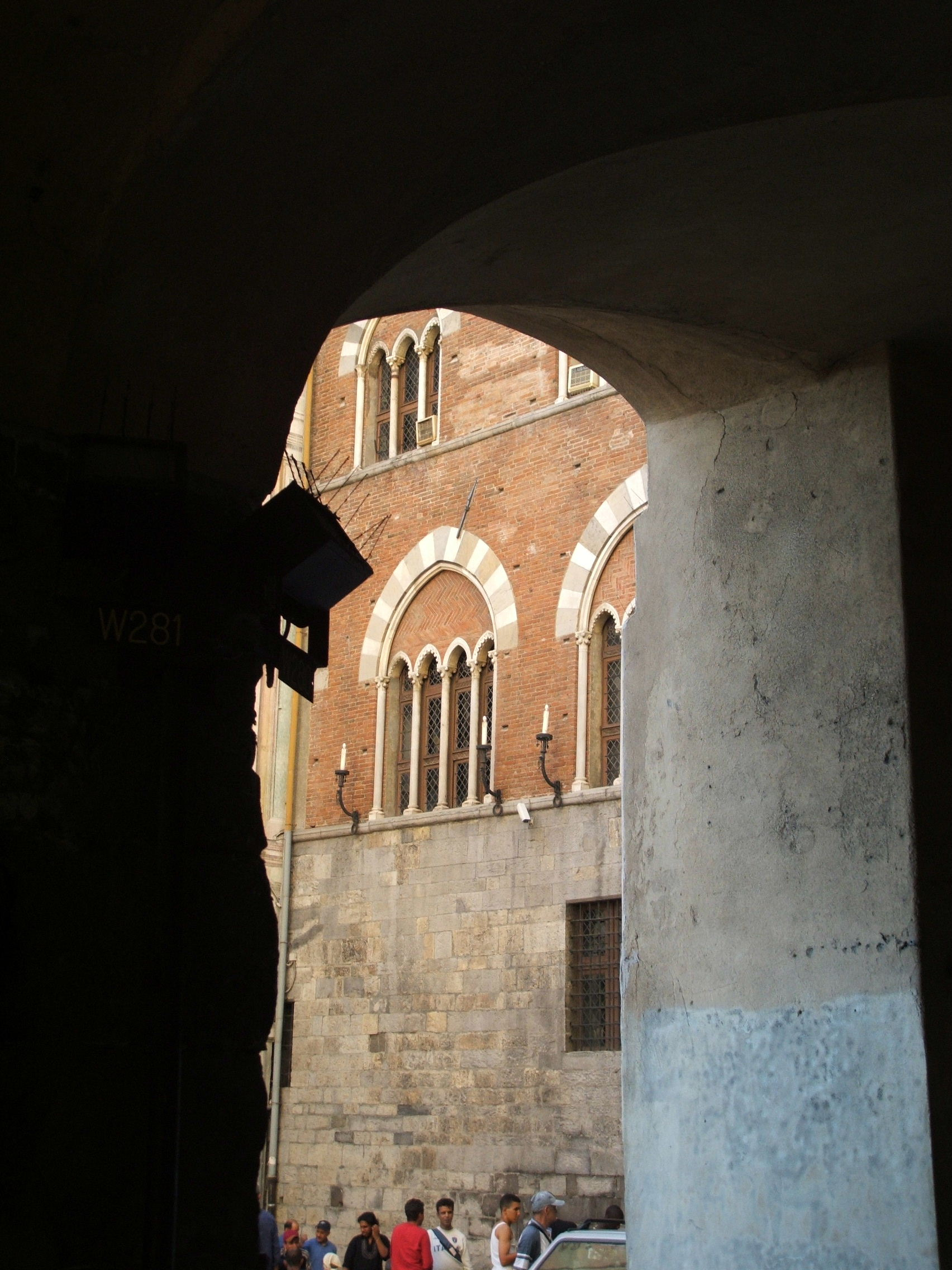 Immagine dalla città di Genova